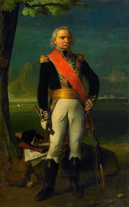 F.X. Donzelot en uniiorme de général